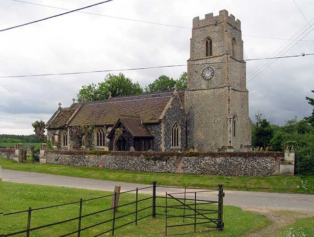 St Peter's Church, Ickburgh, Norfolk